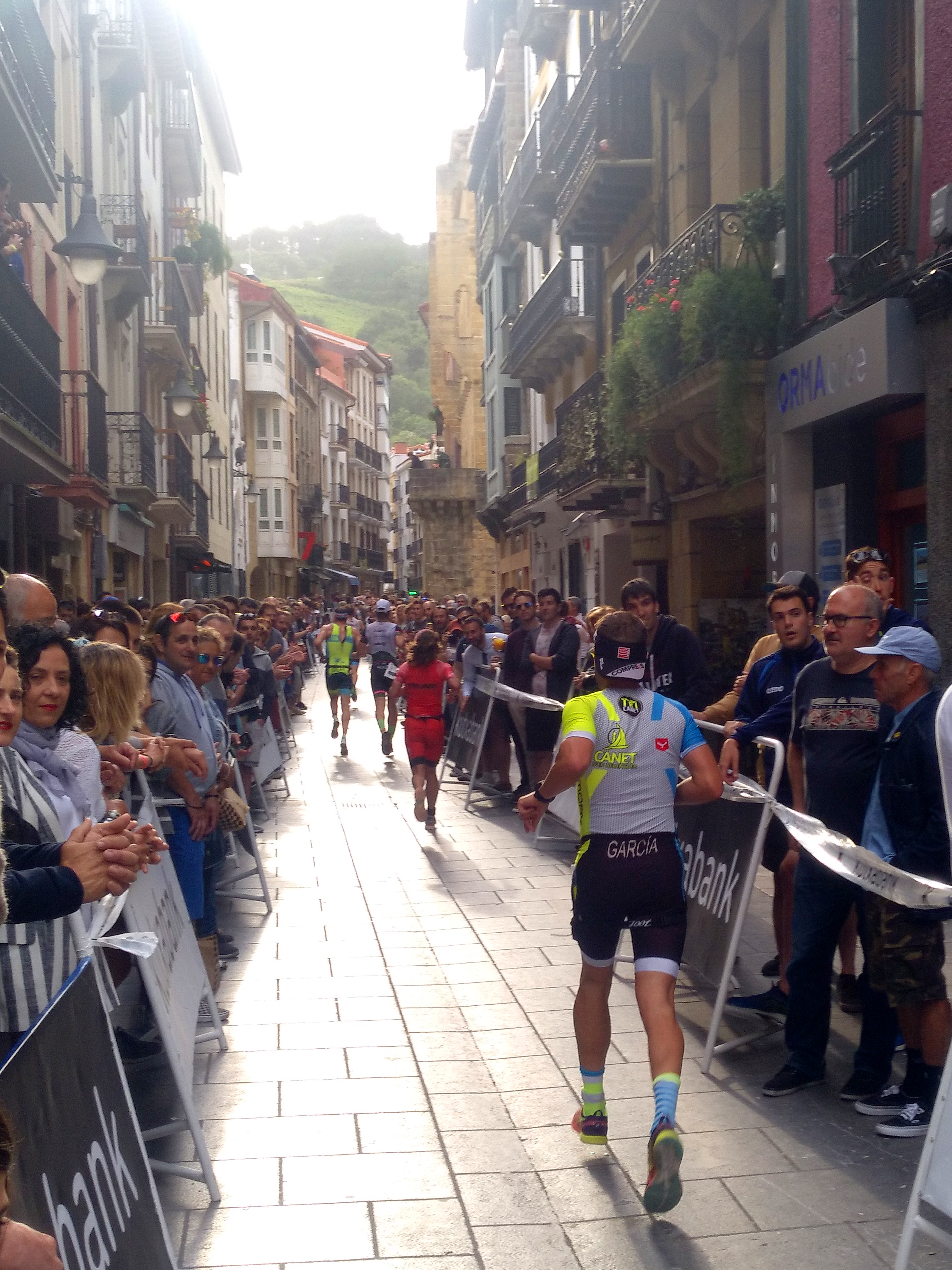 Zarauzko triatloia 2019